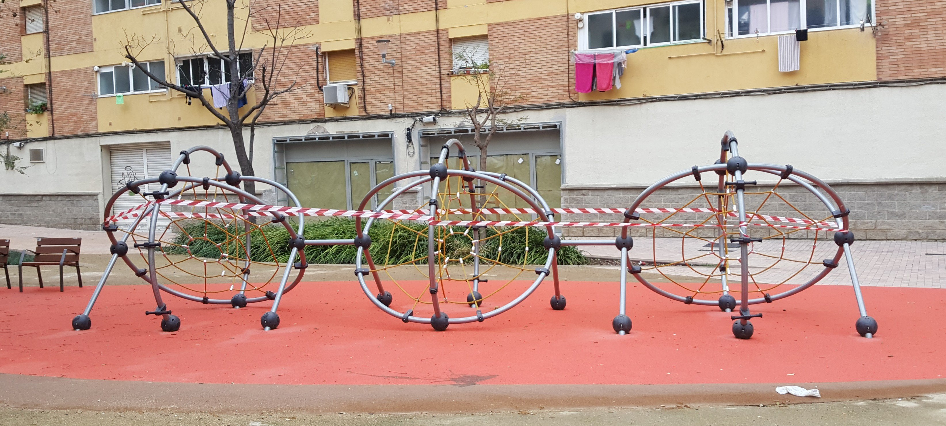 Parc infantil de Sant Martí tancat arran del confinament per la COVID19